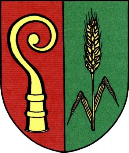 znak,Horní Rožínka , okres Žďár nad Sázavou